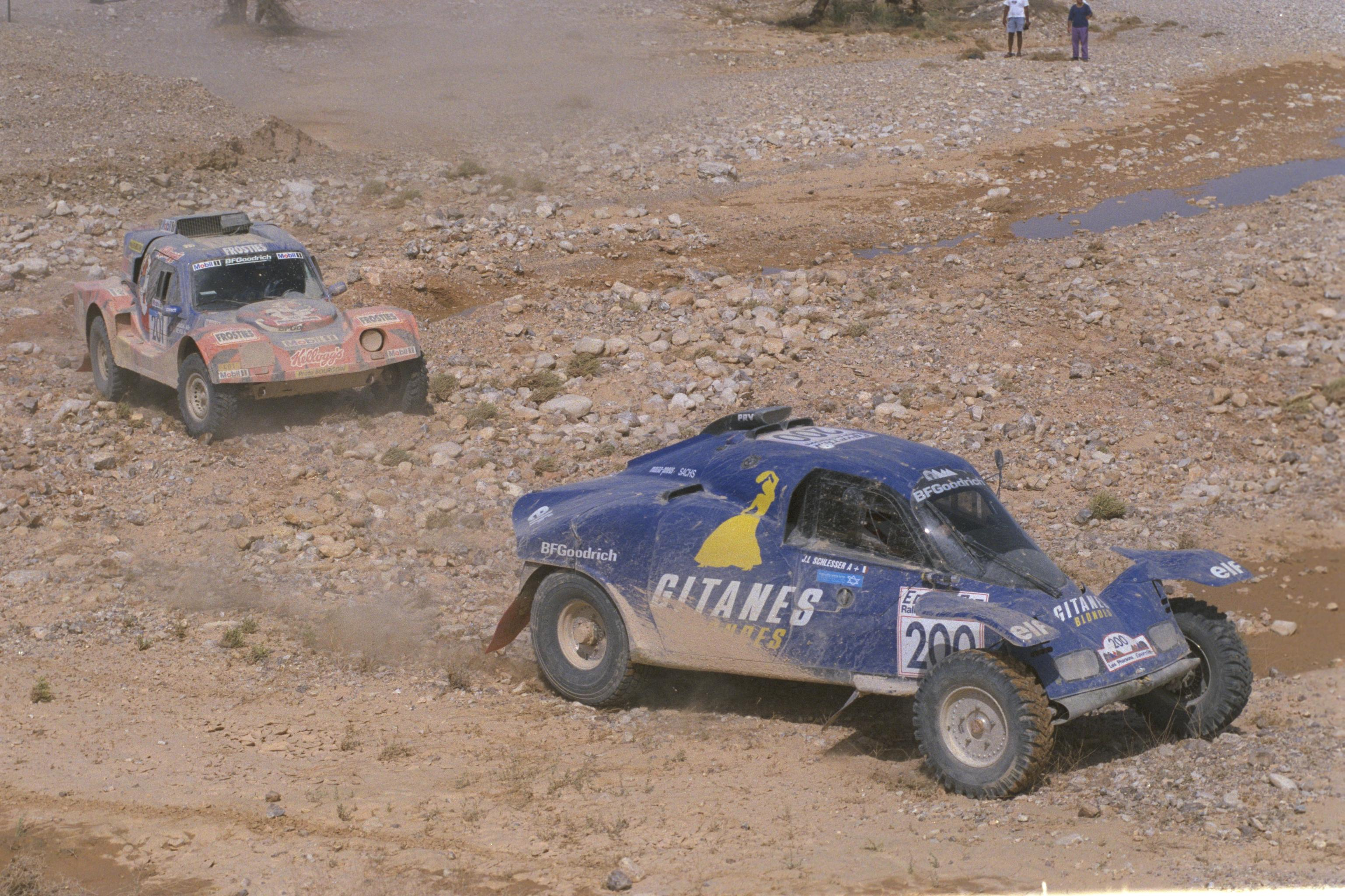 THE PHARAOHS RALLY IN THE NEGEV (08/10/1994). מרוץ 'פרעה' בנגב Photo: OHAYON AVI.